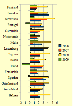 Inflatinsraten im Vergleich zum Vorjahr